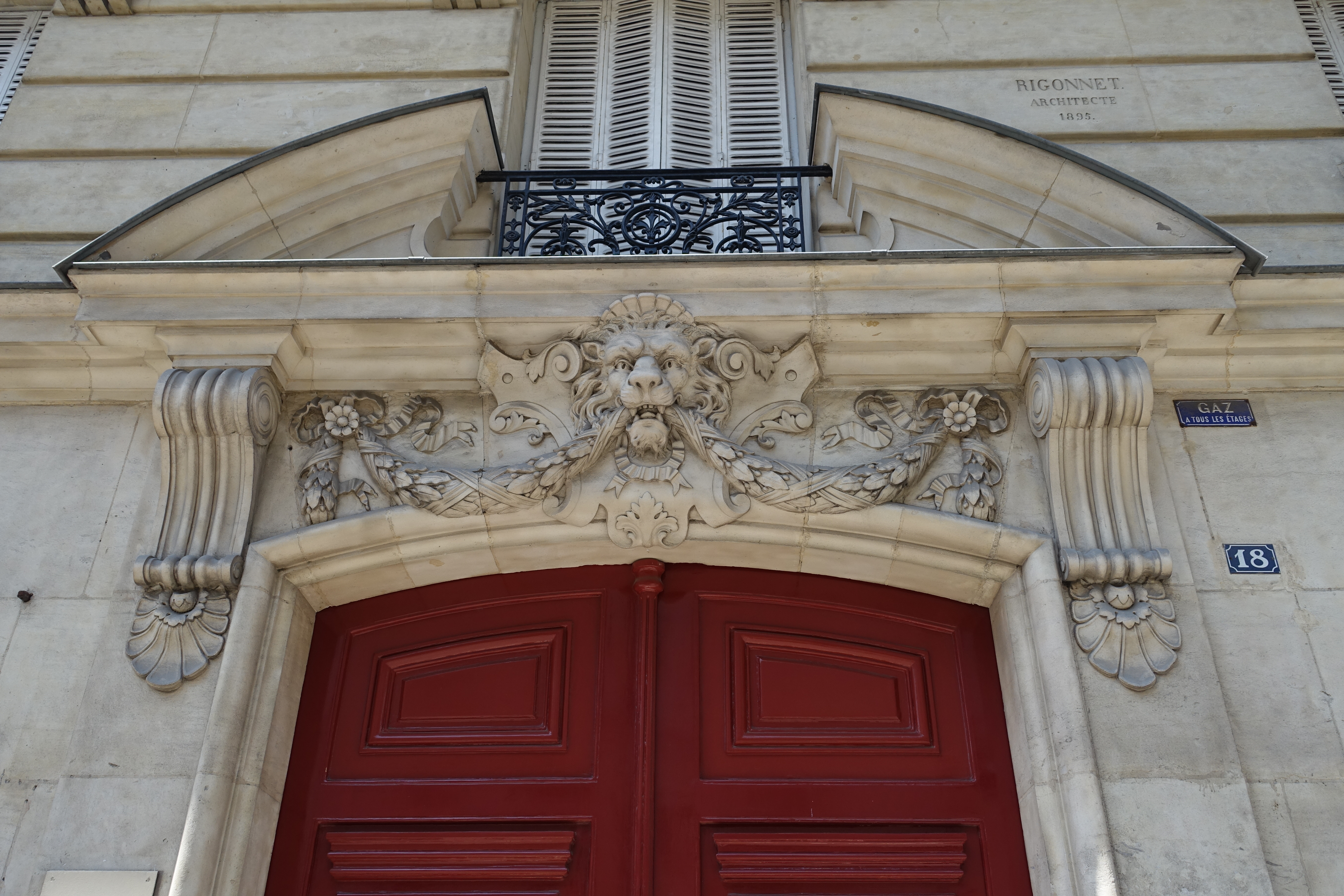 Rigonnet, architecte, 1895 - 18 Rue Friant, XIVe arrondissement, Paris, France